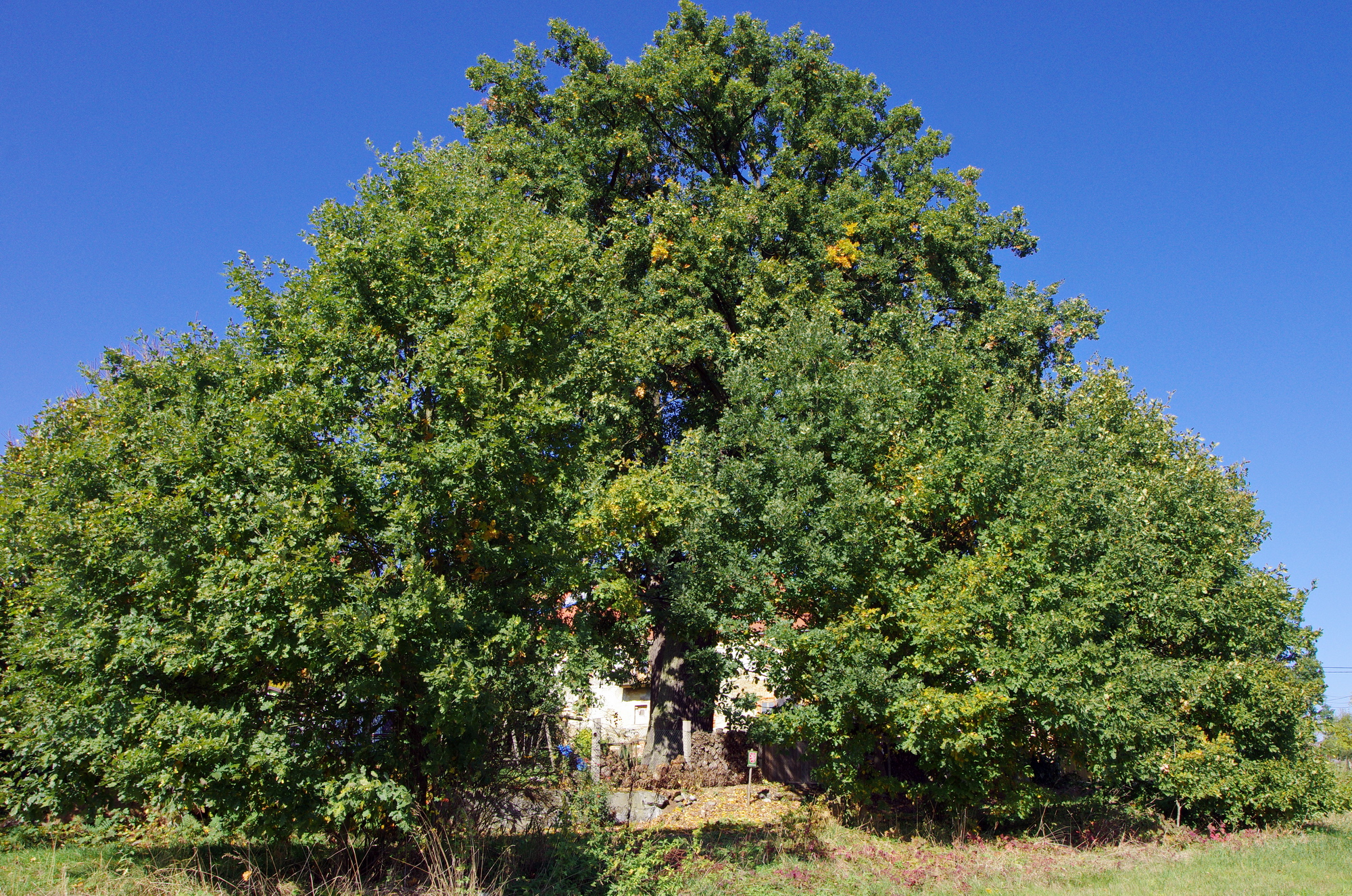 Památný strom - Dub ve Slapanech, Slapany, okres Cheb